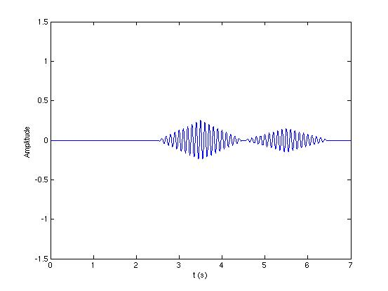 Filtrage adapté entre un sinus d'amplitude unité (T=1s, A=1, f0=10 Hz) et deux copies déphasées de 3 et 5 secondes, et atténuées de 0.5 et 0.3 respectivement Adapted filtering between a unit sine (T=1s, f0 = 10Hz) and two copies, one dephased by 3 seconds and attenuated by a factor 2, one dephased by 5 seconds and having an amplitude of 0.3